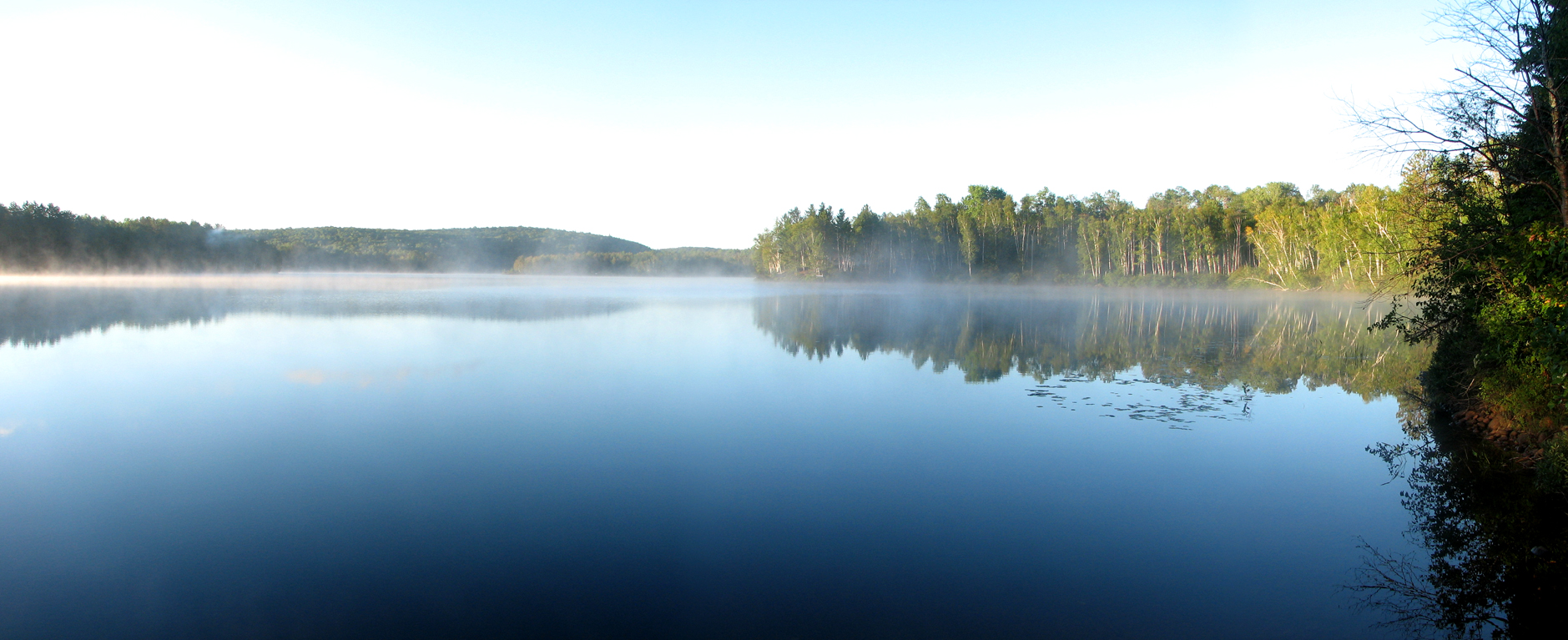 Lake St. Peter